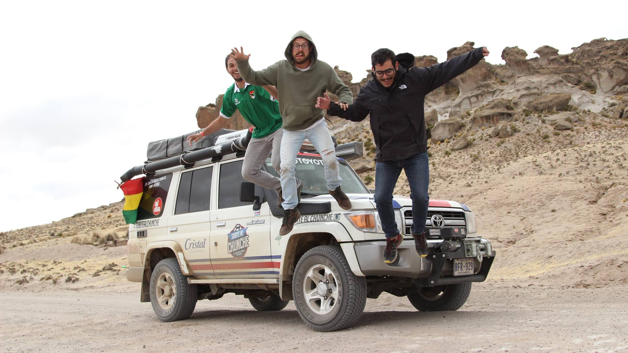 Integrantes del proyecto Subite al Chunche en el Salar de Uyuni, Bolivia; el vehículo es un Toyota Land Cruiser J70, utilizado para la edición 2014 de dicho proyecto.